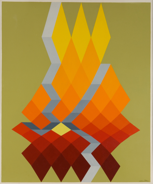 ohne Titel, Arcylmalerei auf dickem Schaumstoff